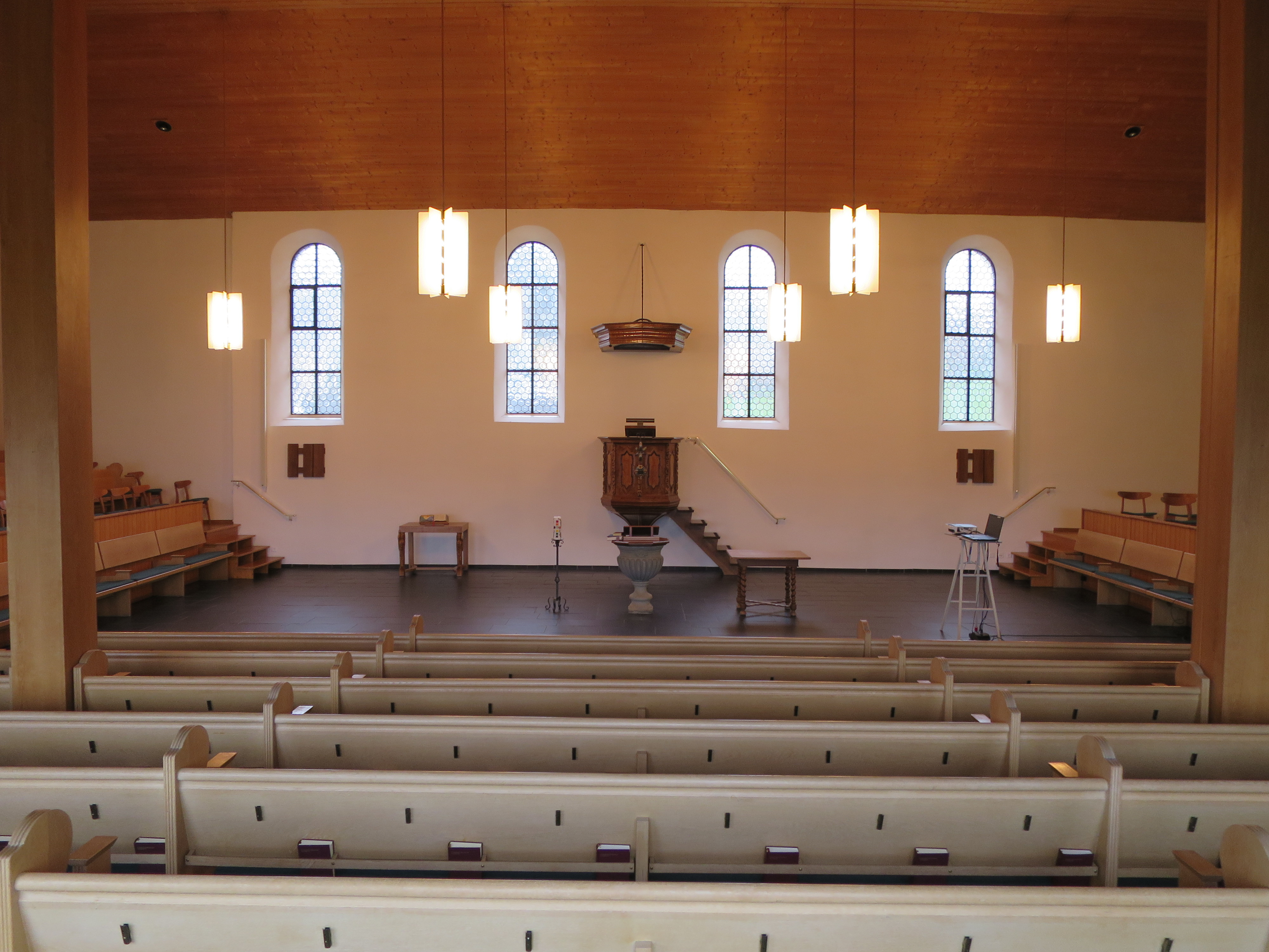 Ref. Kirche Rüschlikon - Blick nach Westen